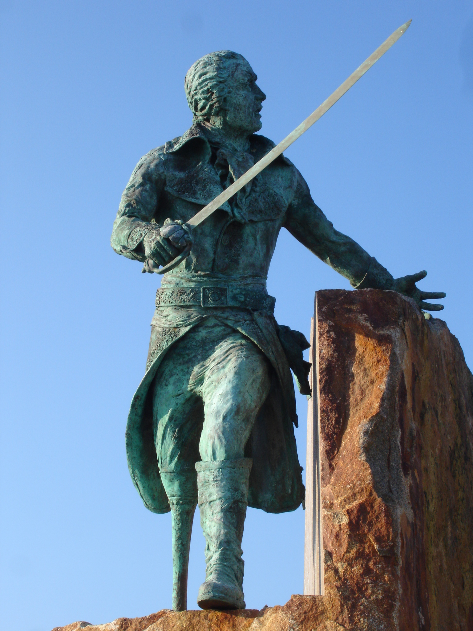 Serge Santucci: Hommage à Pleville Le Pelley ou Le Corsaire, statue en pied (après 2001), bronze, sur socle de granit, Granville, Manche, France. Georges-René Péville Le Pelley fut corsaire, puis Gouverneur du port de Marseille, amiral, ministre de la Marine et des Colonies, sénateur. Cette oeuvre remplace une statue précédente, disparue, de Jean Magrou, qui avait été érigée en 1907.